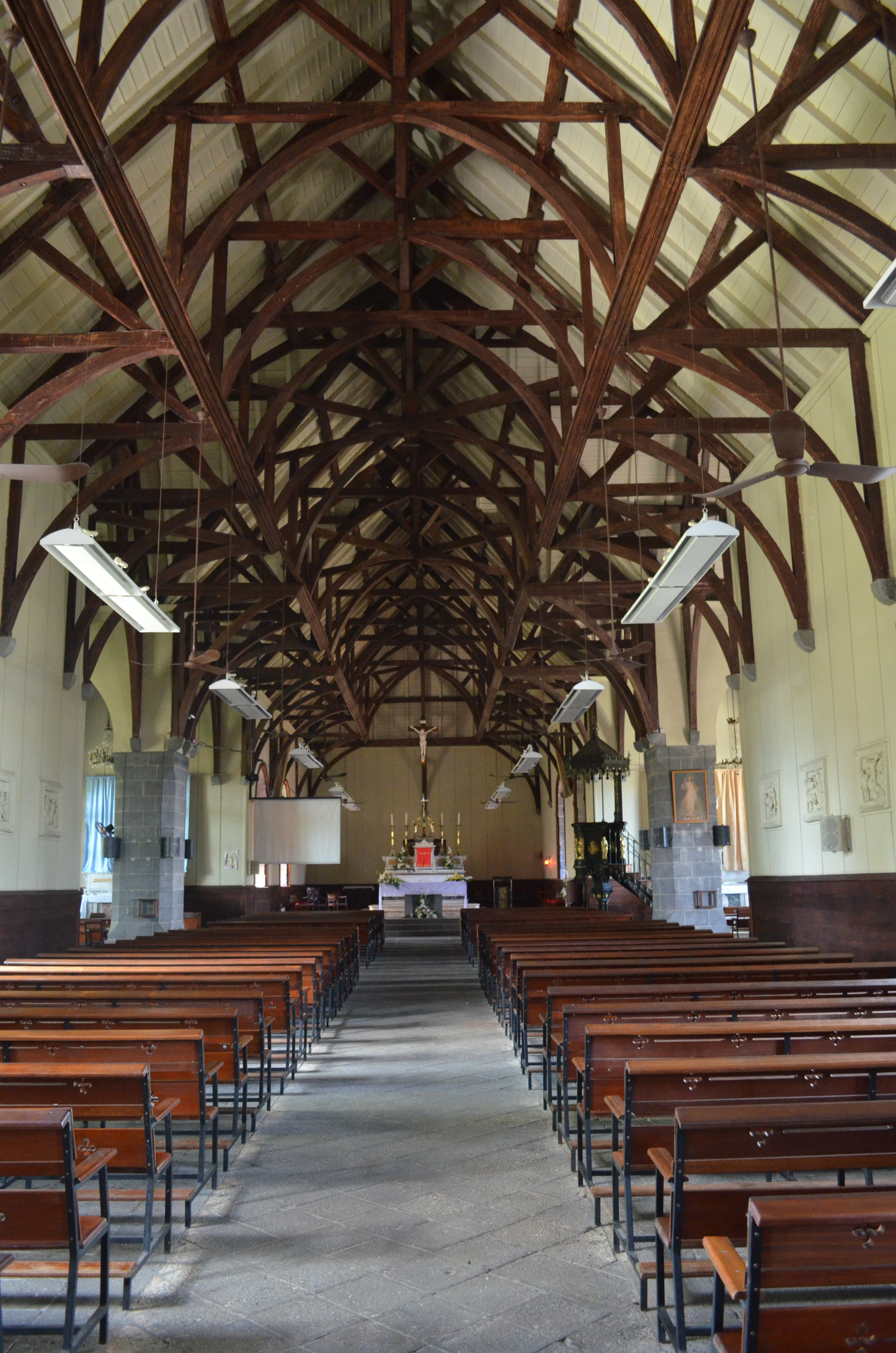 Pamplemousses, Eglise Saint François d‘Assise, interieur